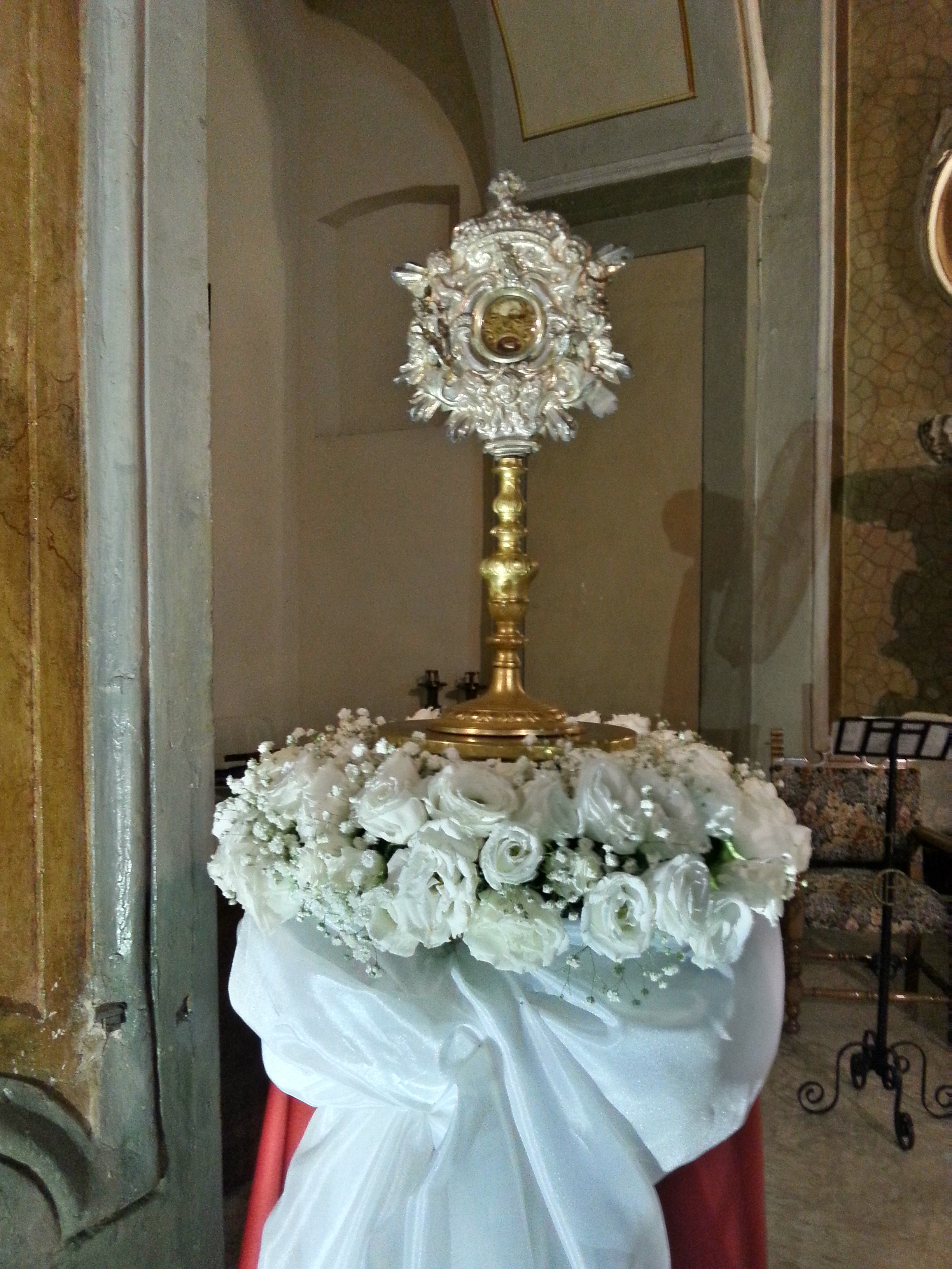 Reliquie Santi Giacomo e Filippo